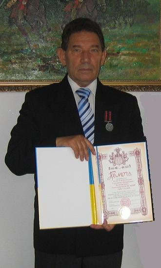 Aleksander wielki książę Podolski - Regent Unii Polskich Ugrupowań Monarchistycznych